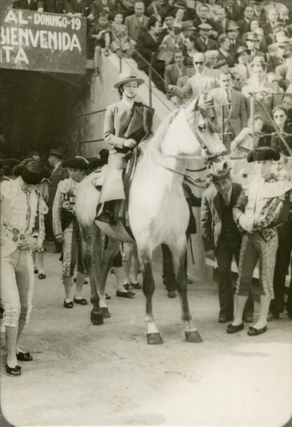 Conchita Cintrón y su cuadrilla en la plaza de toros de Santa María la Real de Nieva (Segovia, España)